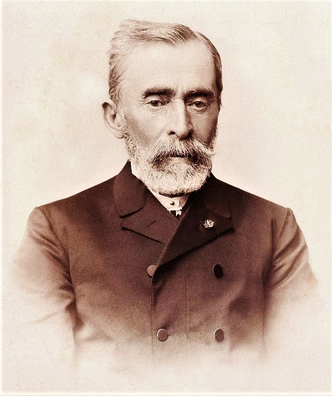 Jordaki Freiherr Wassilko von Serecki (* 04. März 1795; † 06.November 1861), Anno 1860